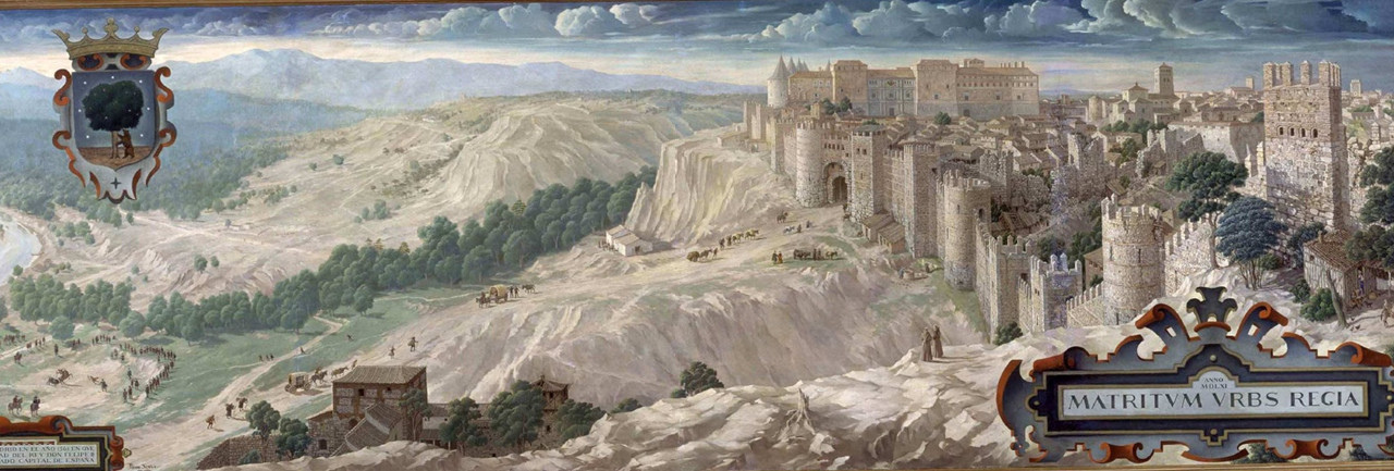 Recreación imaginaria del Madrid de mediado el siglo XVI, pintada hacia 1950 por Pierre Schild para el Ayuntamiento de Madrid y adquirida por la familia González para el Restaurante Casa Botín de Madrid.